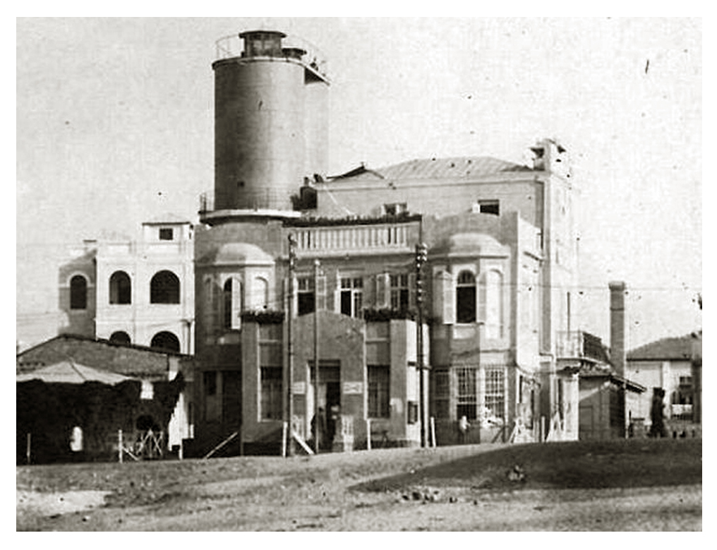 בית הוועד